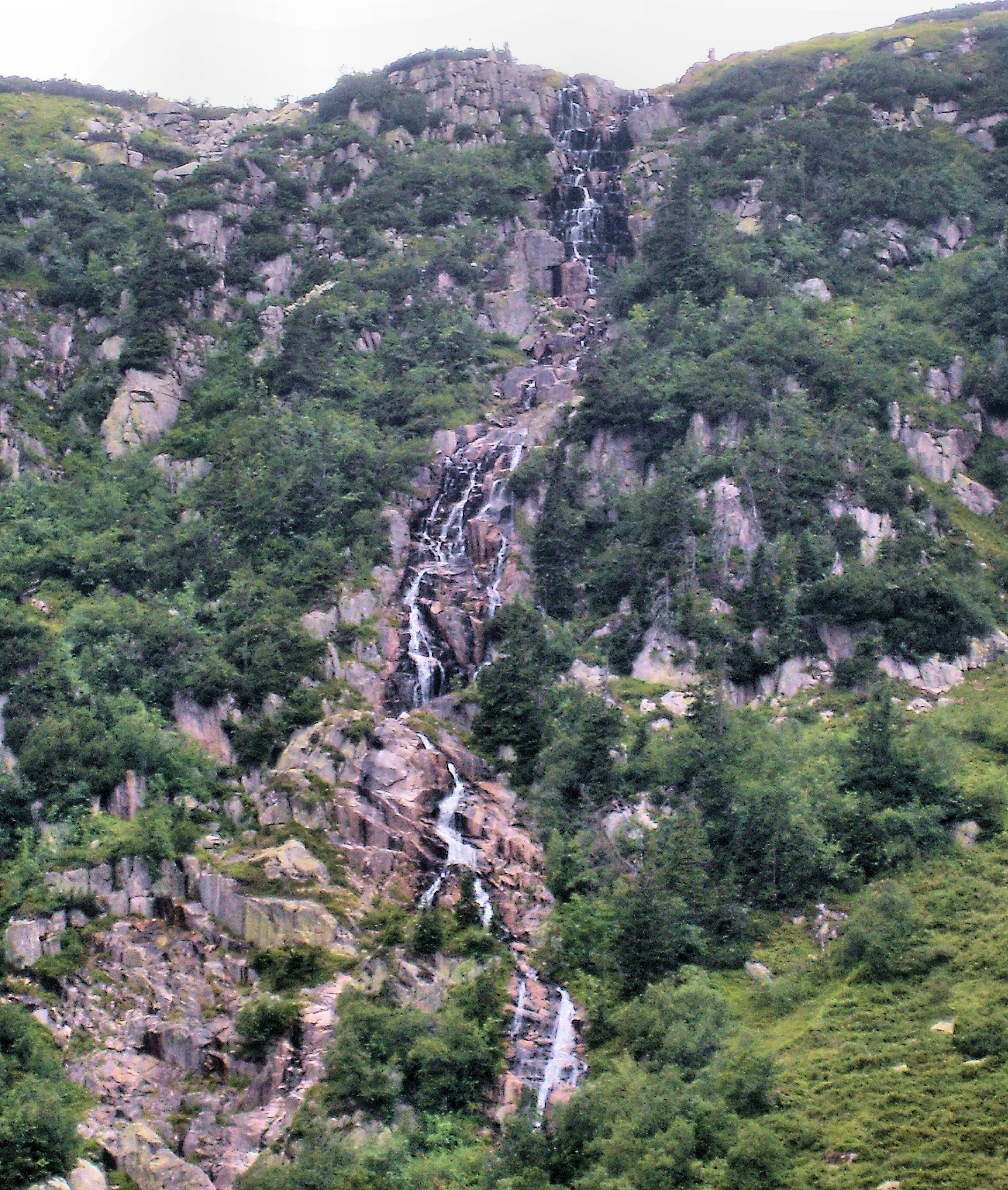 Nejvyšší vodopád v České republice